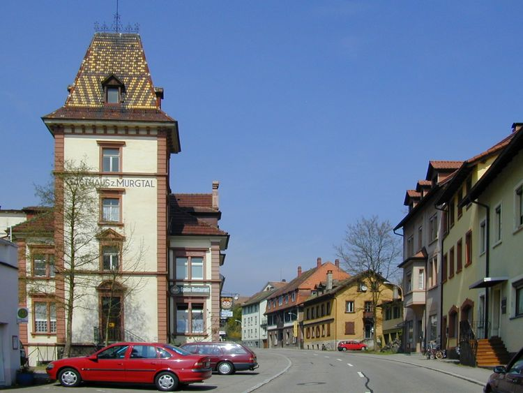 Ortszentrum von Murg im Jahr 2002